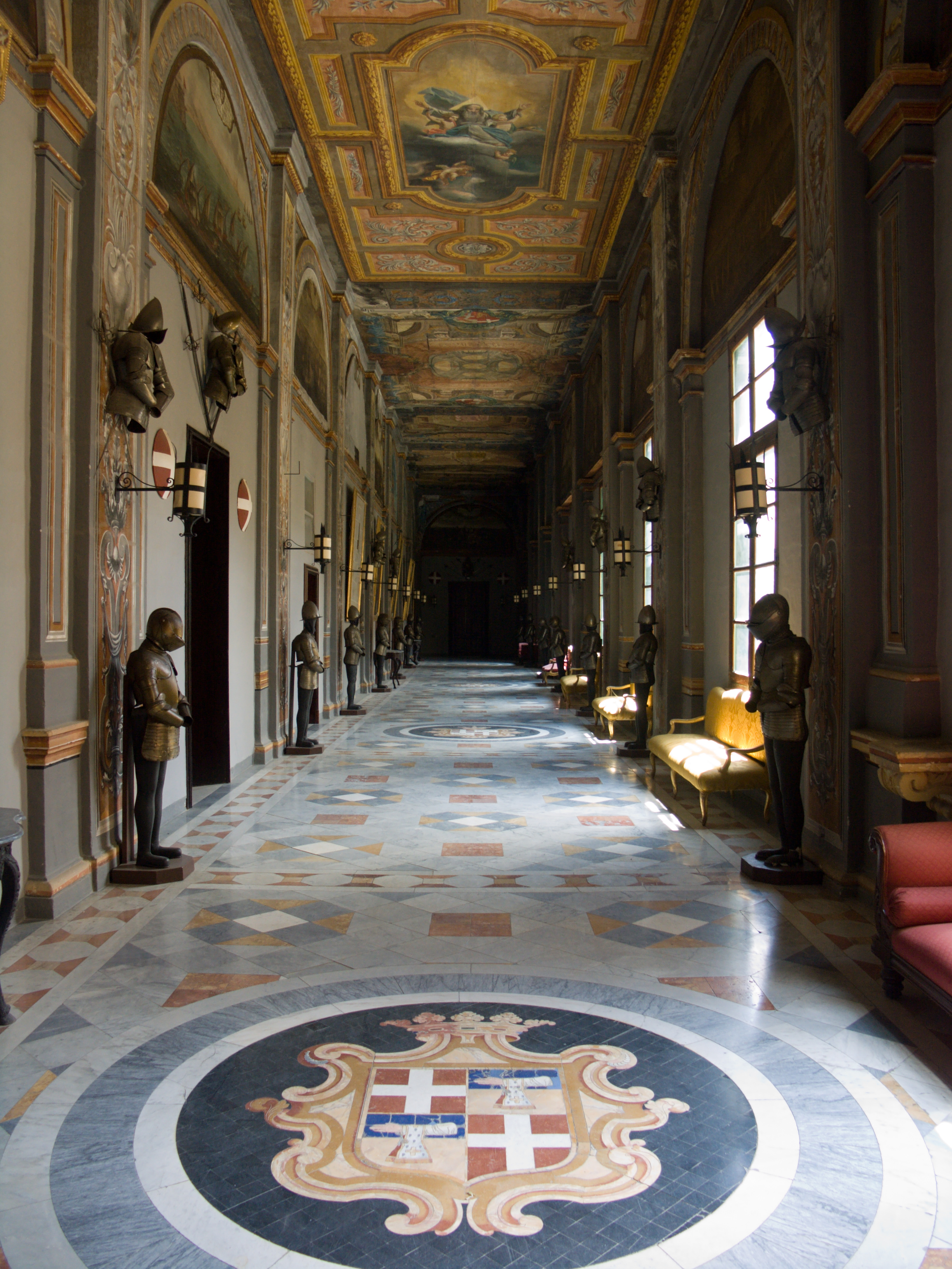 Un couloir du palais des grands maitres à La Valette, Malte